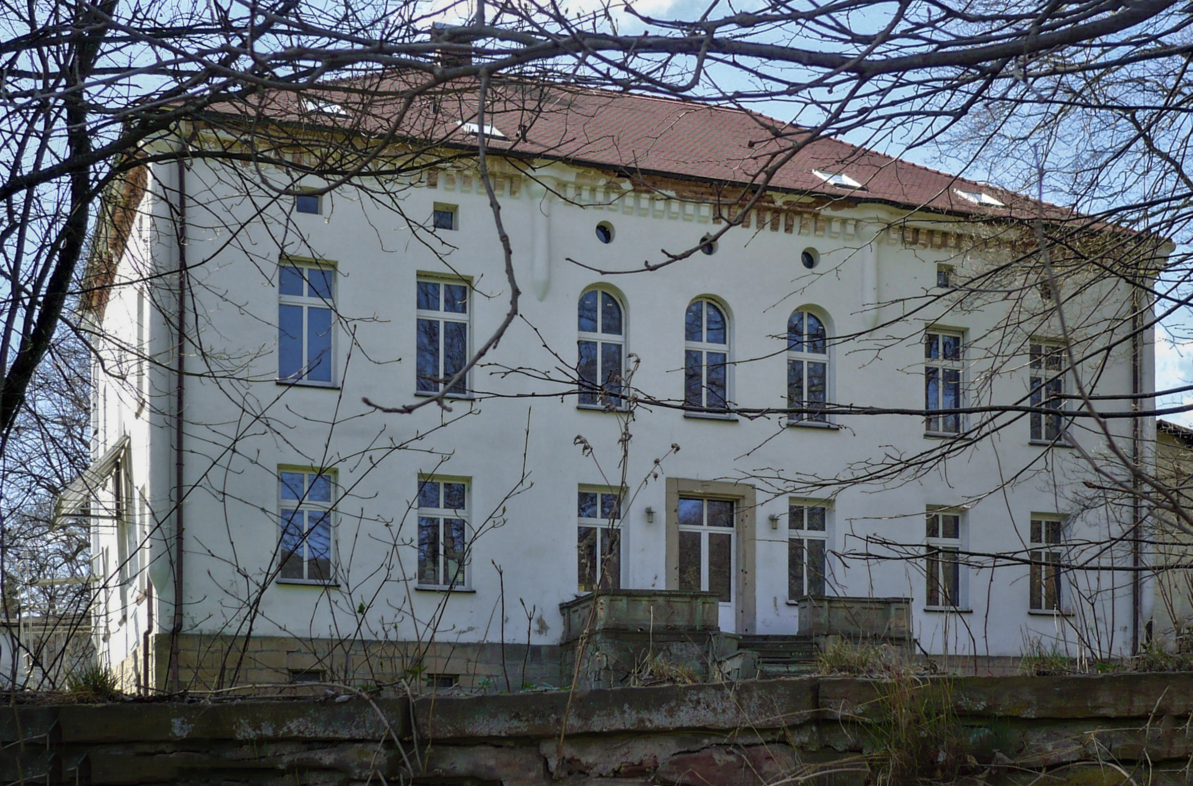 Tłumaczów. Dwór